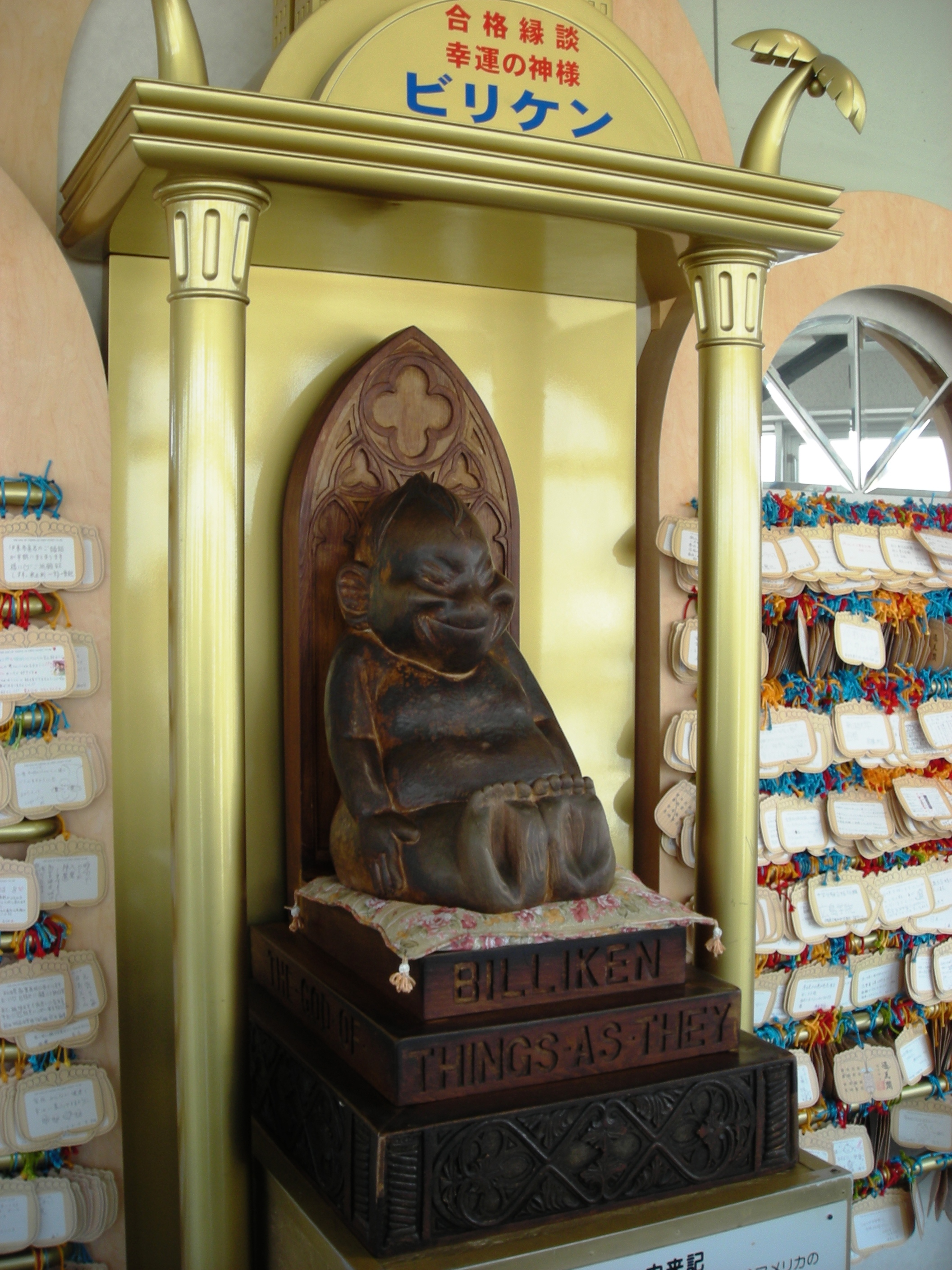 Billiken